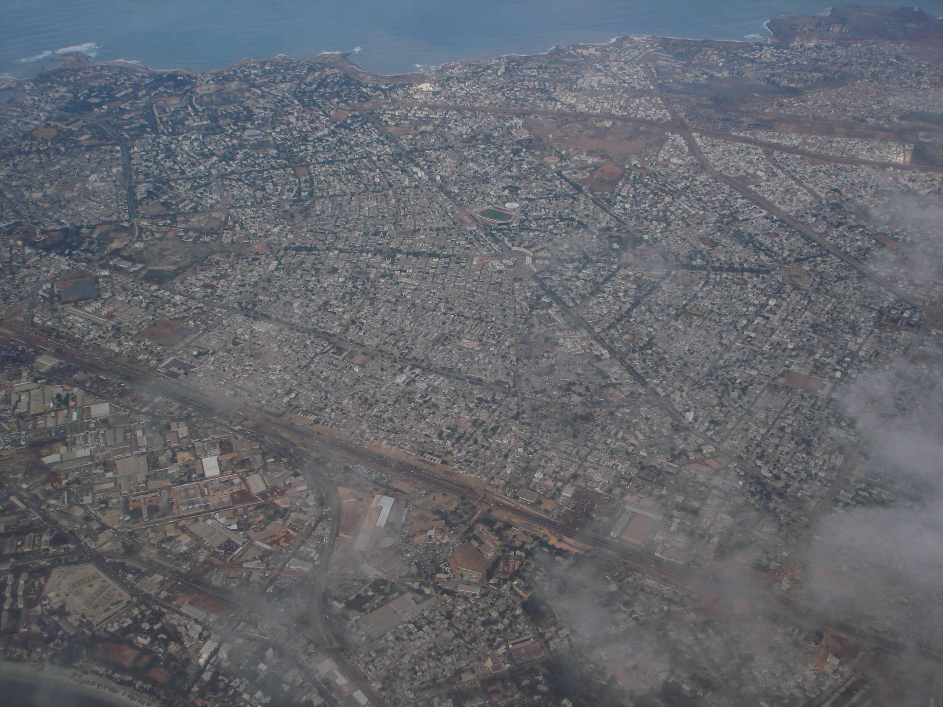 Vue aérienne de Dakar